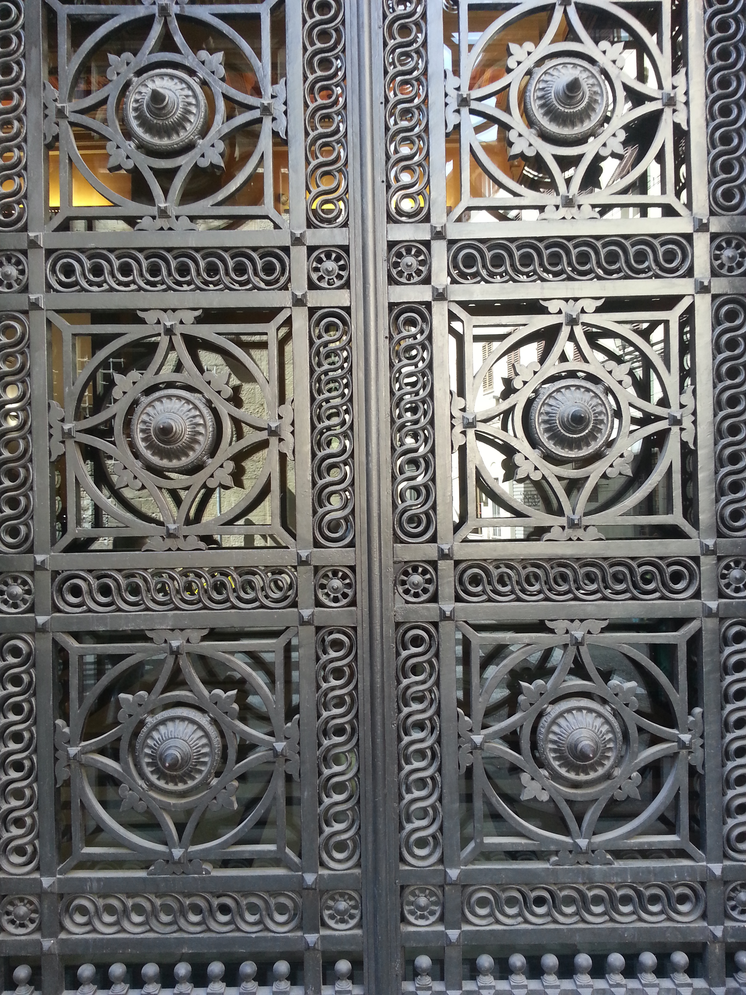 Porta destra del Palazzo della Banca d'Italia a Firenze via dell'oriuolo 39